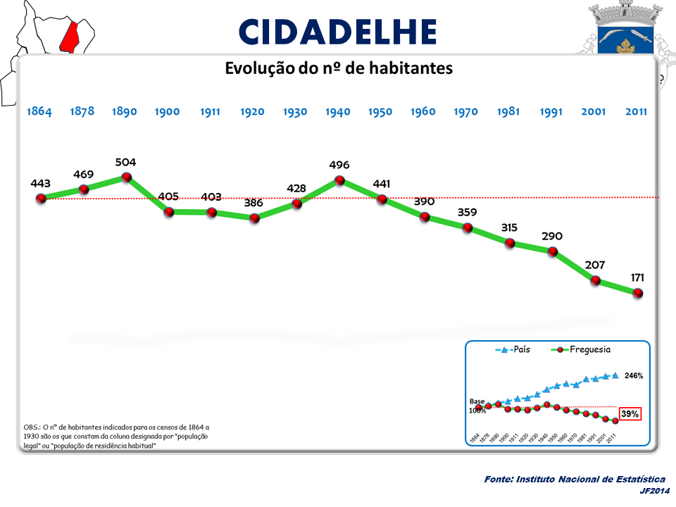 Evolução da População 1864 / 2011